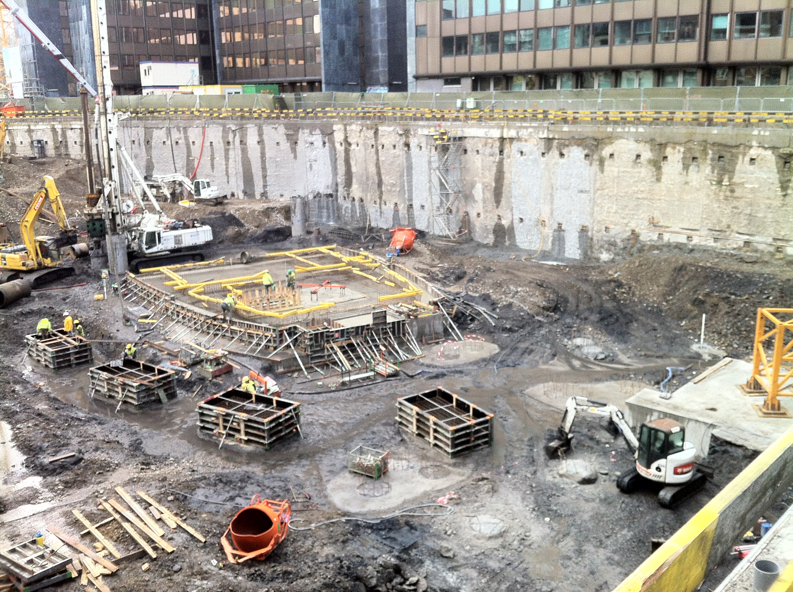 Travaux de la tour des finances en février 2013